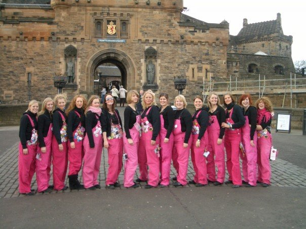 Candiss foran Edinburgh Castle, Skottland 2007.